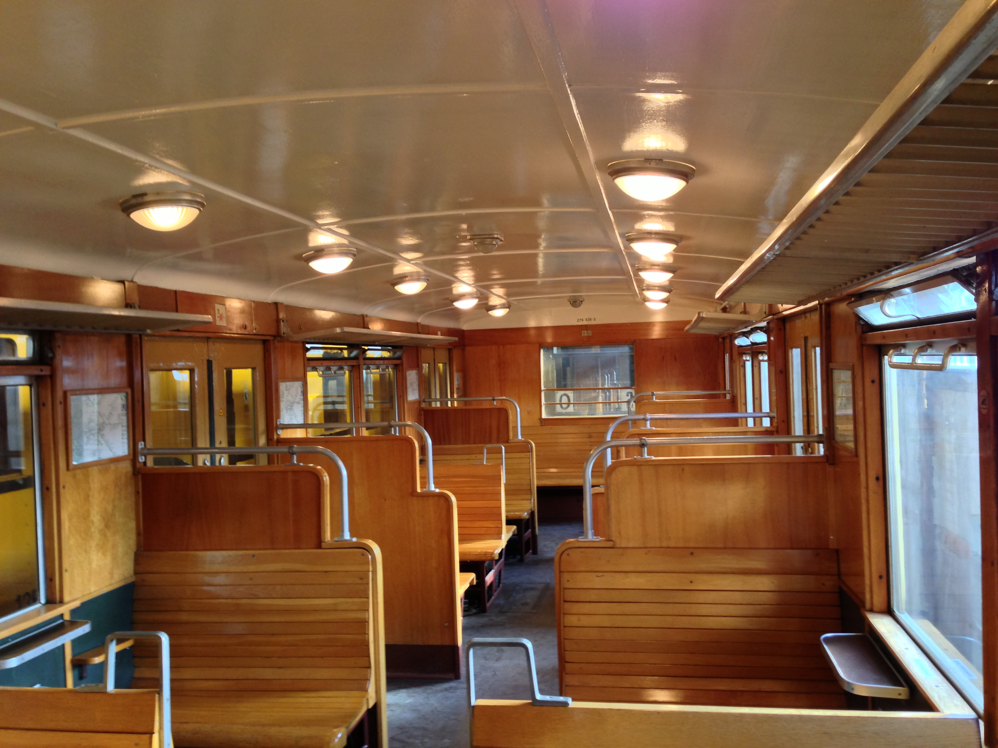 Depot des Deutschen Technikmuseums Berlin, Triebwagen 276 035 des Bankier-Probezuges Bauart 1934, ab 1941 ET 125 001; Fahrgastraum Richtung Kurzkuppelende. Bis auf die deutlich größeren Fenster und die auf gleiche Höhe heruntergezogenen Türfenster entspricht die Einrichtung der der älteren Reihe 275.